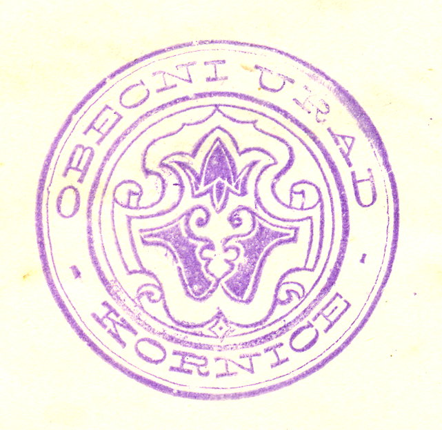 Razítko obecního úřadu v Kornicích u Litomyšle, přelom 19. a 20. století.